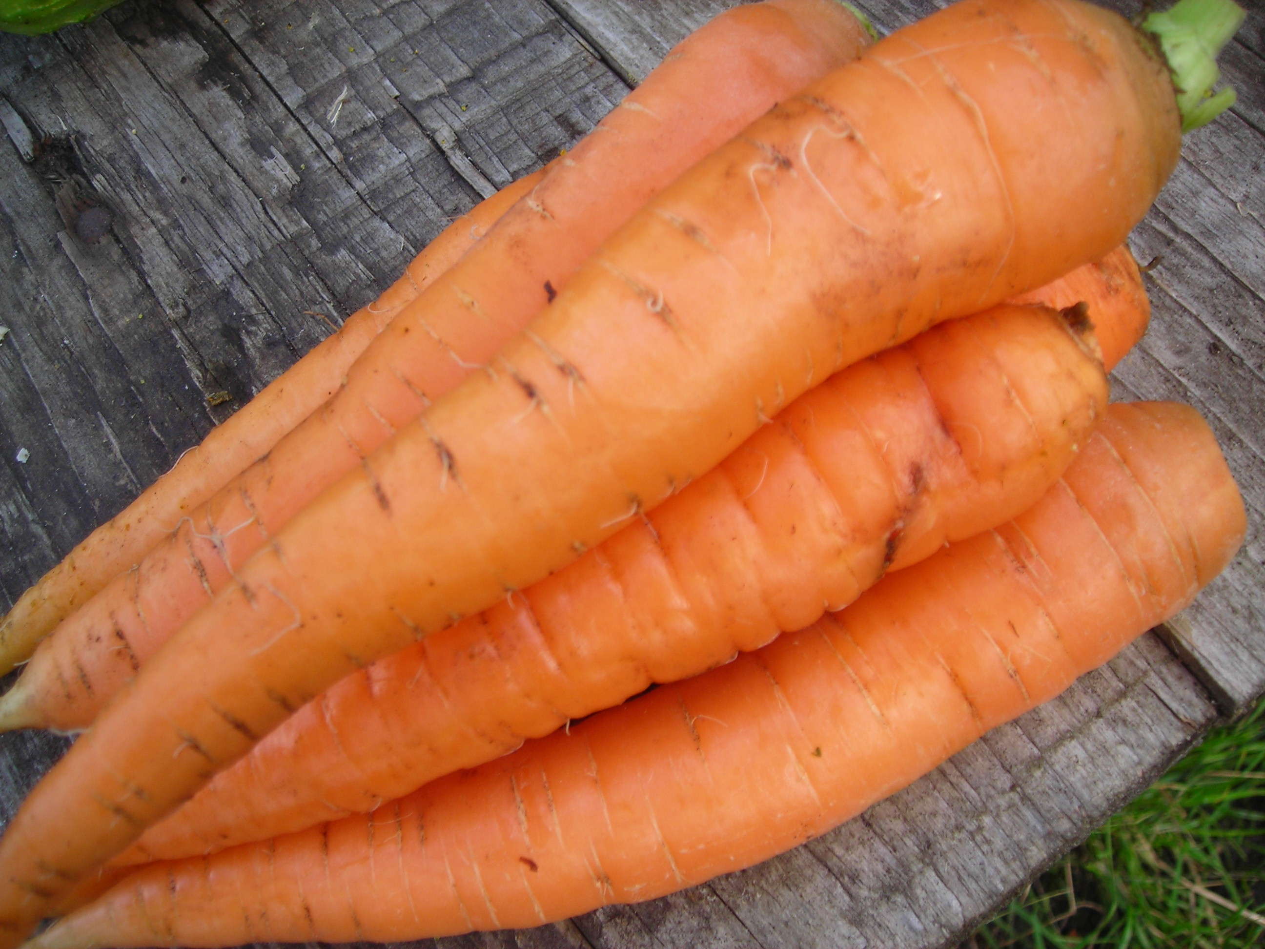 Морковь - Carrot